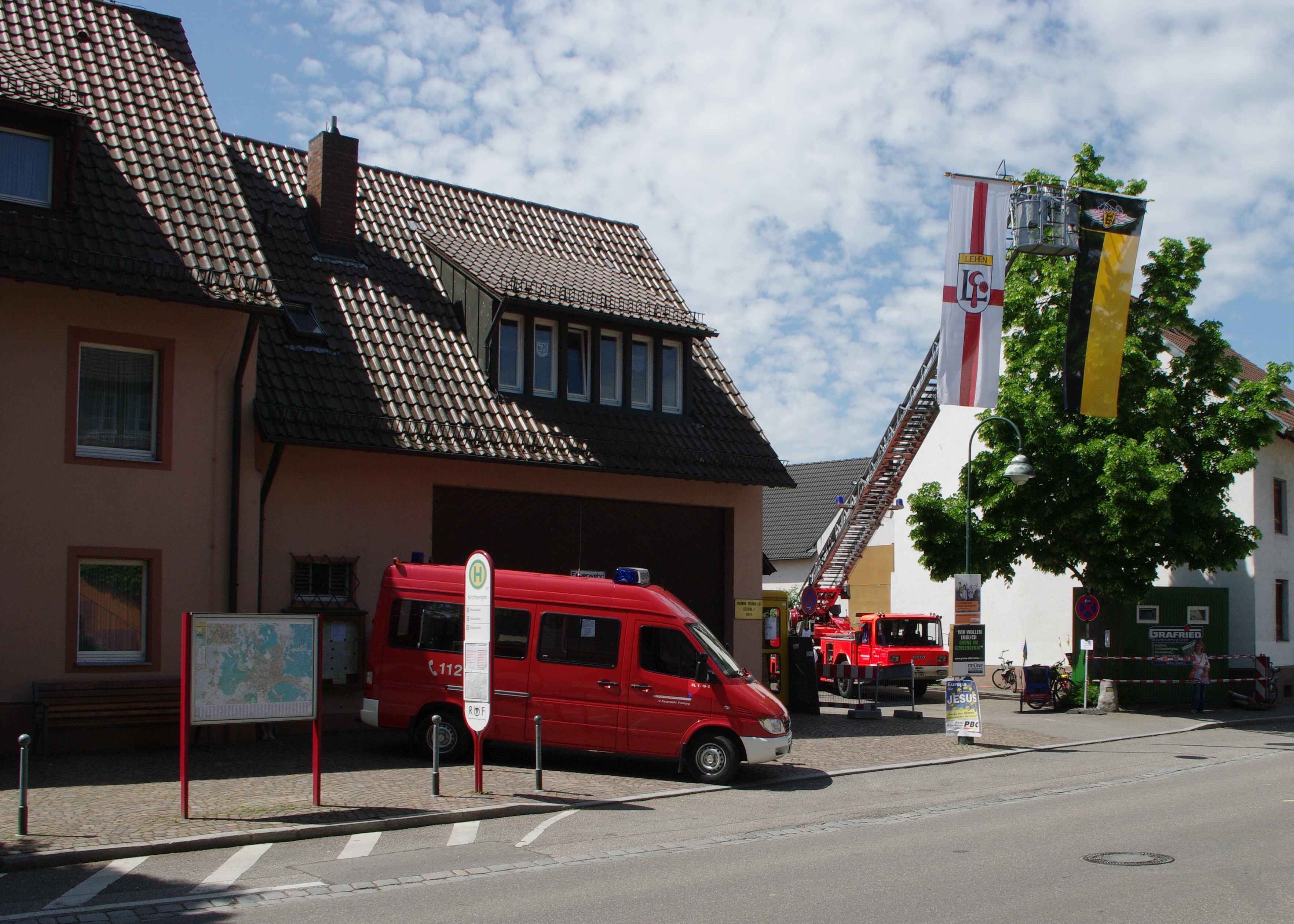 Das zu kleine Wachgebäude der freiwilligen Feuerwehr in Freiburg Lehen am Tag der offenen Tür 2009